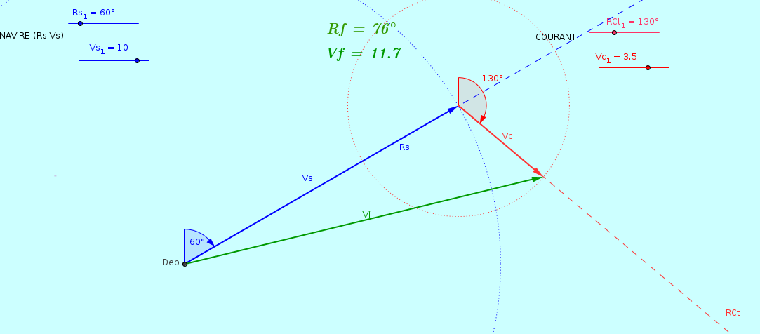 Construction vectorielle (geogebra)